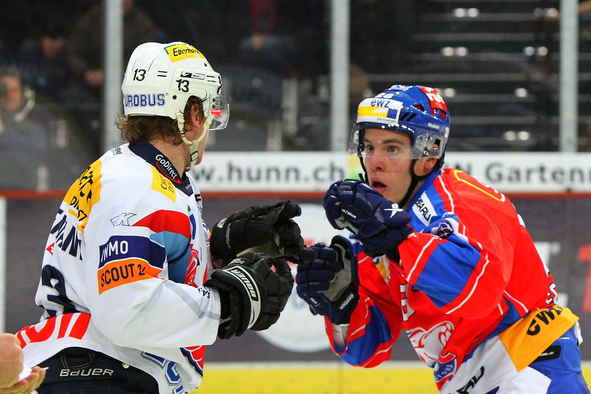 Simon Bodenmann, de dos, et Philippe Schelling, de face, lors d'une rencontre entre le ZSC Lions et les Kloten Flyers le 23 décembre 2010.